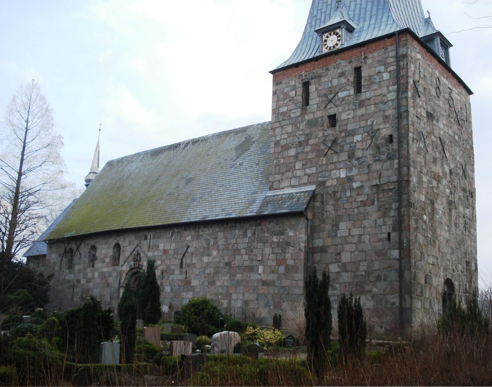 St. Marien-Kirche Sörup - Detail